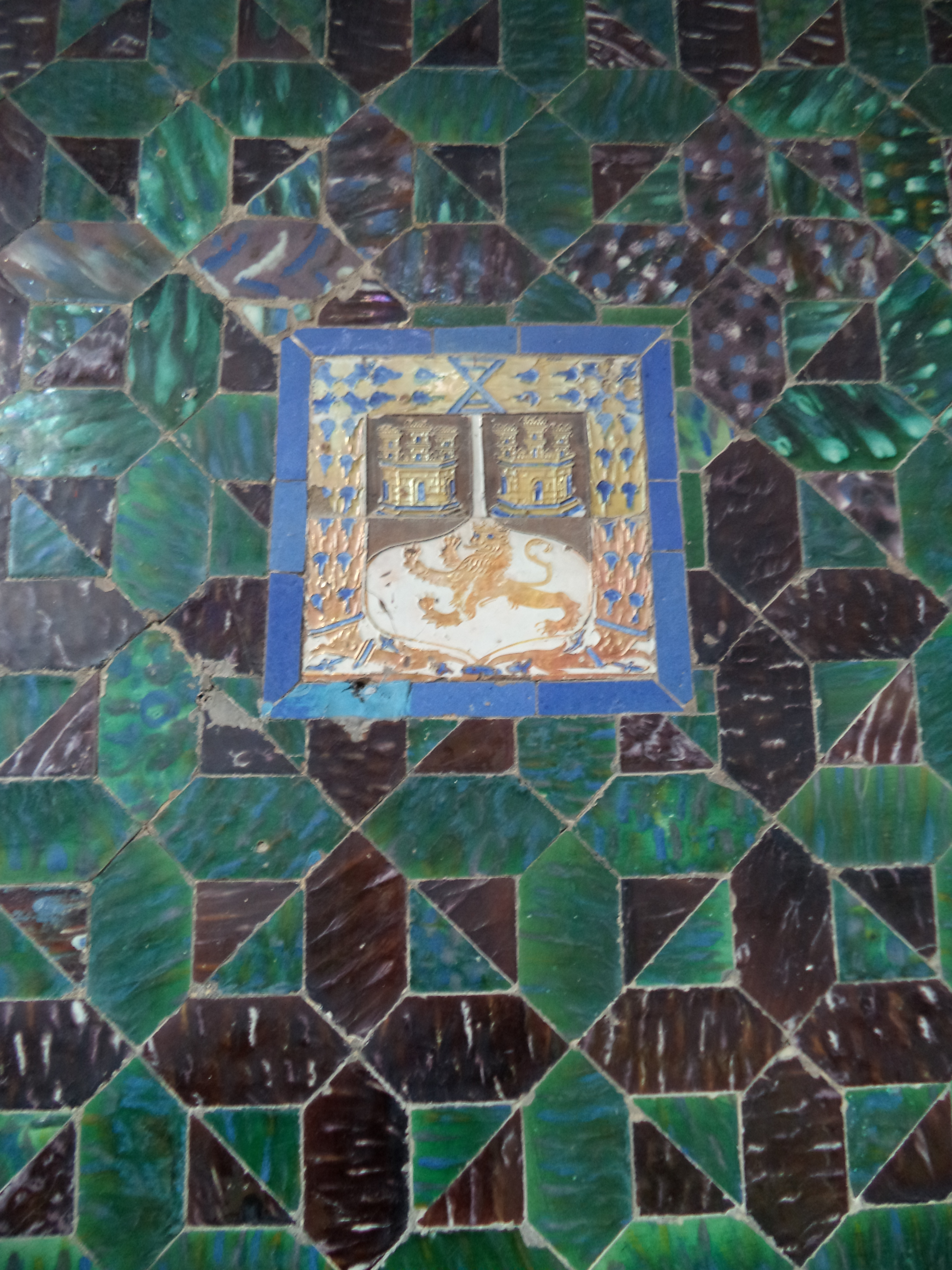 Escudo de la Casa Enríquez en una pared de la Casa de Pilatos de Sevilla